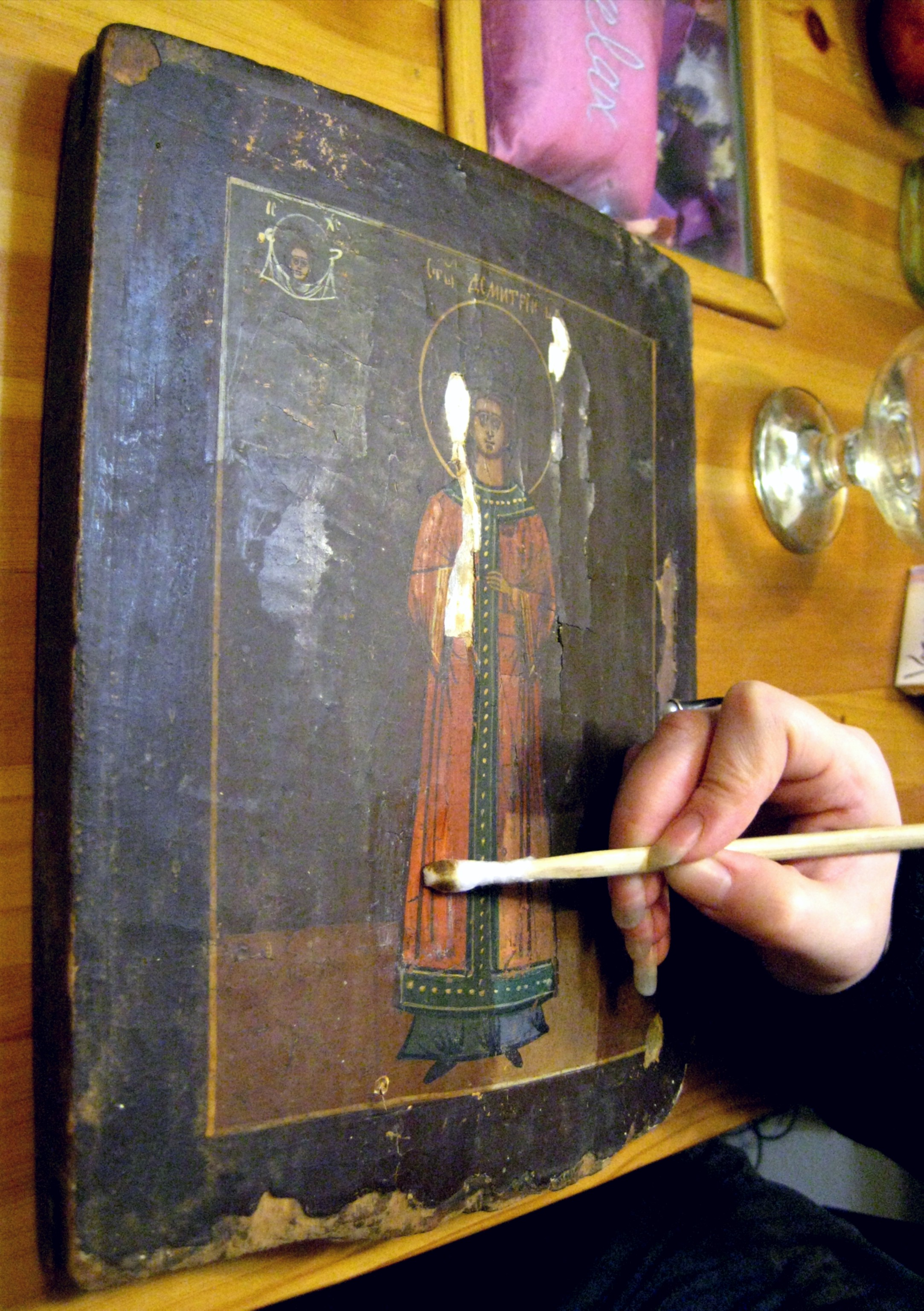 Реставрация иконы царевича Дмитрия. Restoration of icon of tsarevits Dmitriy.